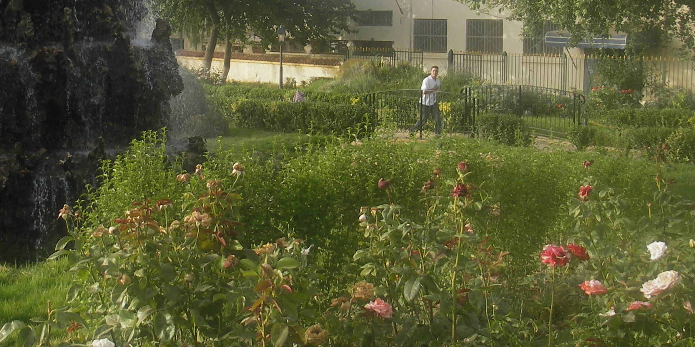 Jardin public face à la mairie d'El Hajeb (Maroc)